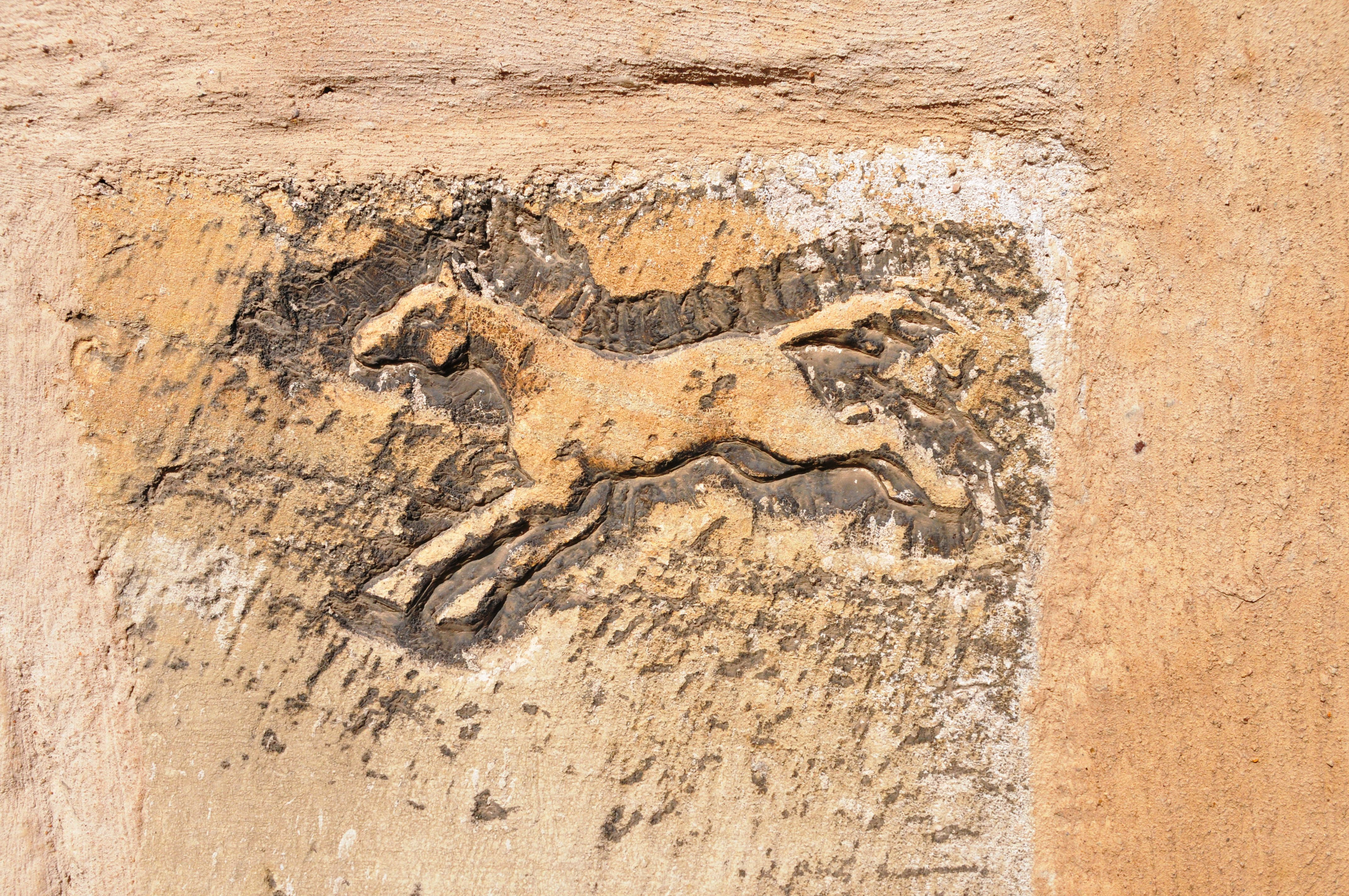 Mücheln, Kirche St. Michael